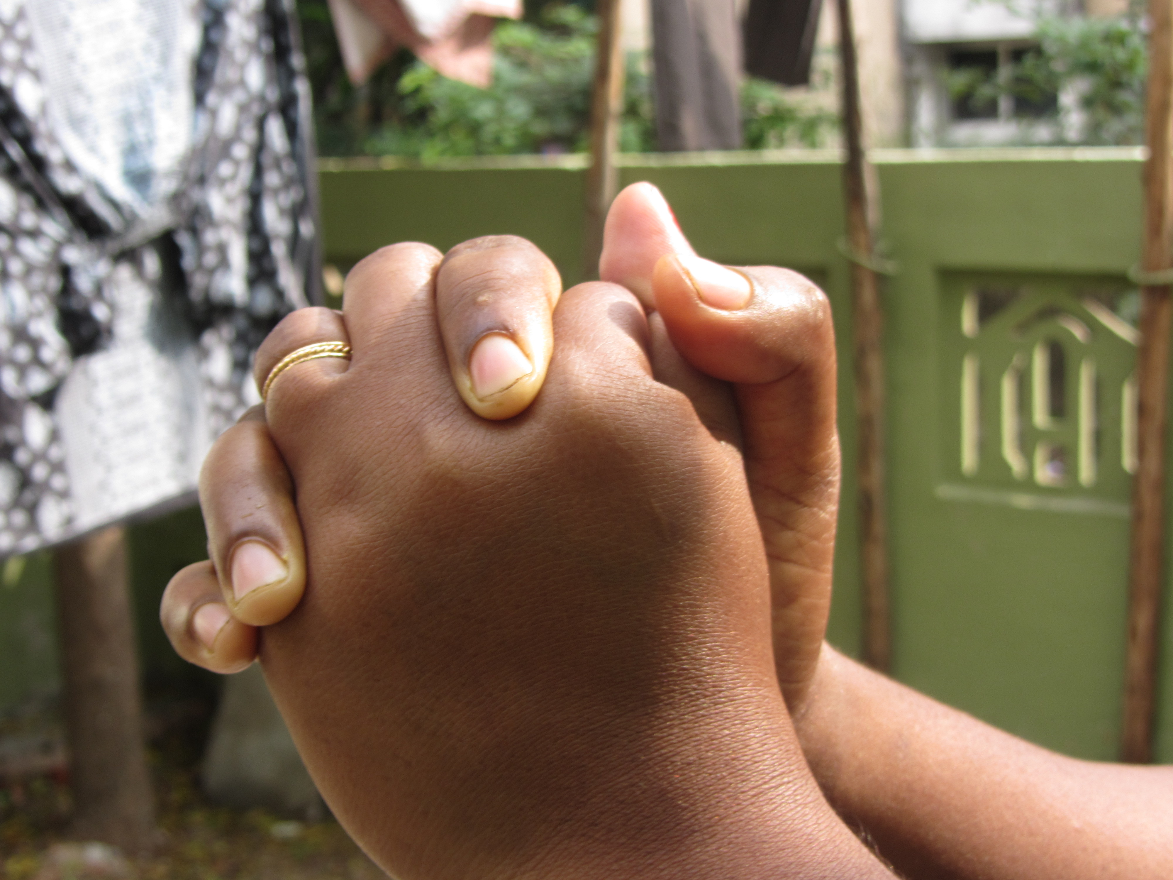 self shot அண்மைய காலத் தமிழர் விளையாட்டுகளில் ஒன்றான 'கேலி' விளையாட்டில் கை காட்டும் முறை 1